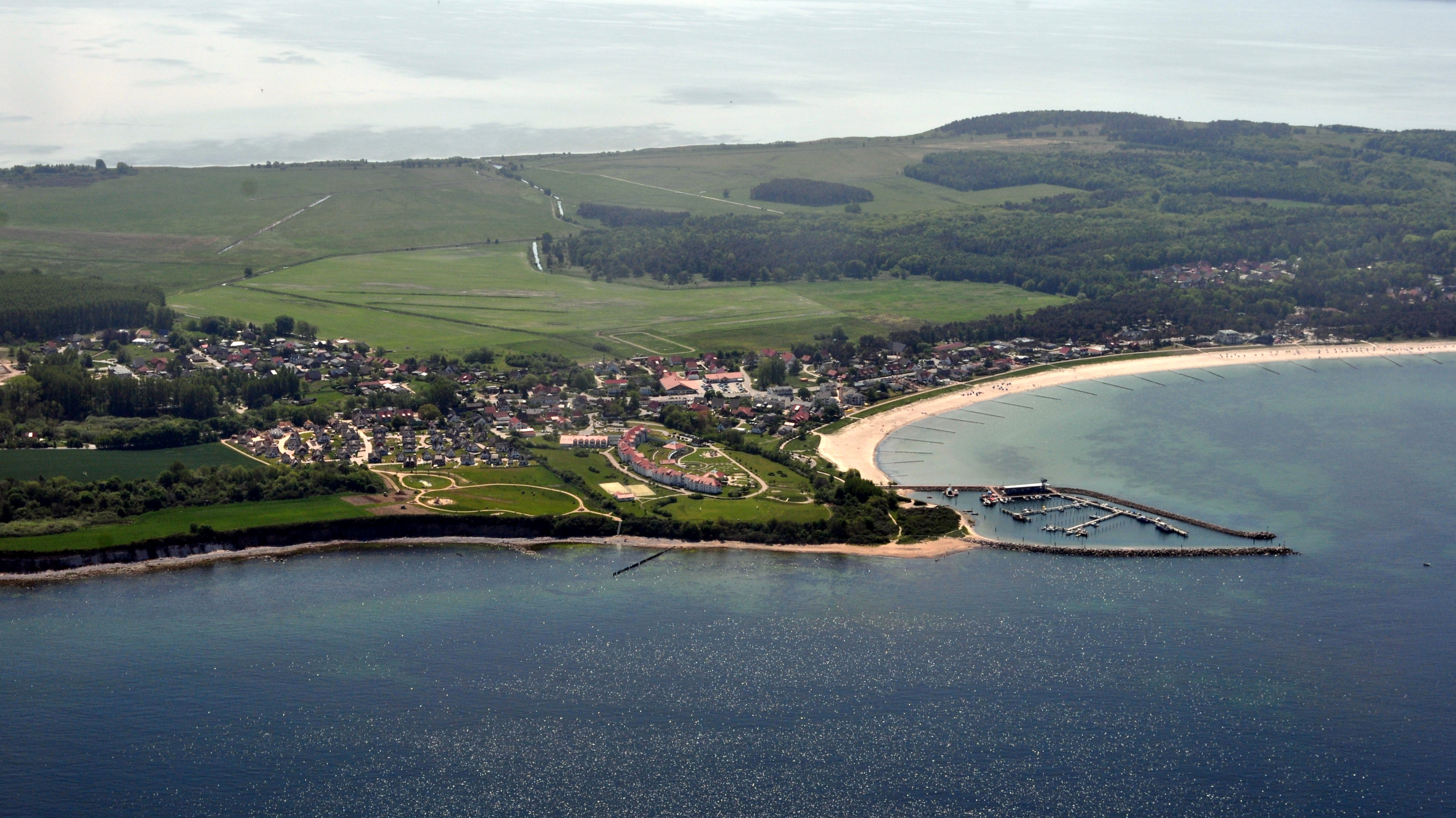 Die Bilder wurden von mir während eines einstündigen Rundflugs ab Flugplatz Güttin am 21. Mai 2011 aufgenommen. Die Bildbeschreibung steht im Dateinamen. Aufgenommen mit einer Nikon D5000 durch das Seitenfenster des Flugzeugs.